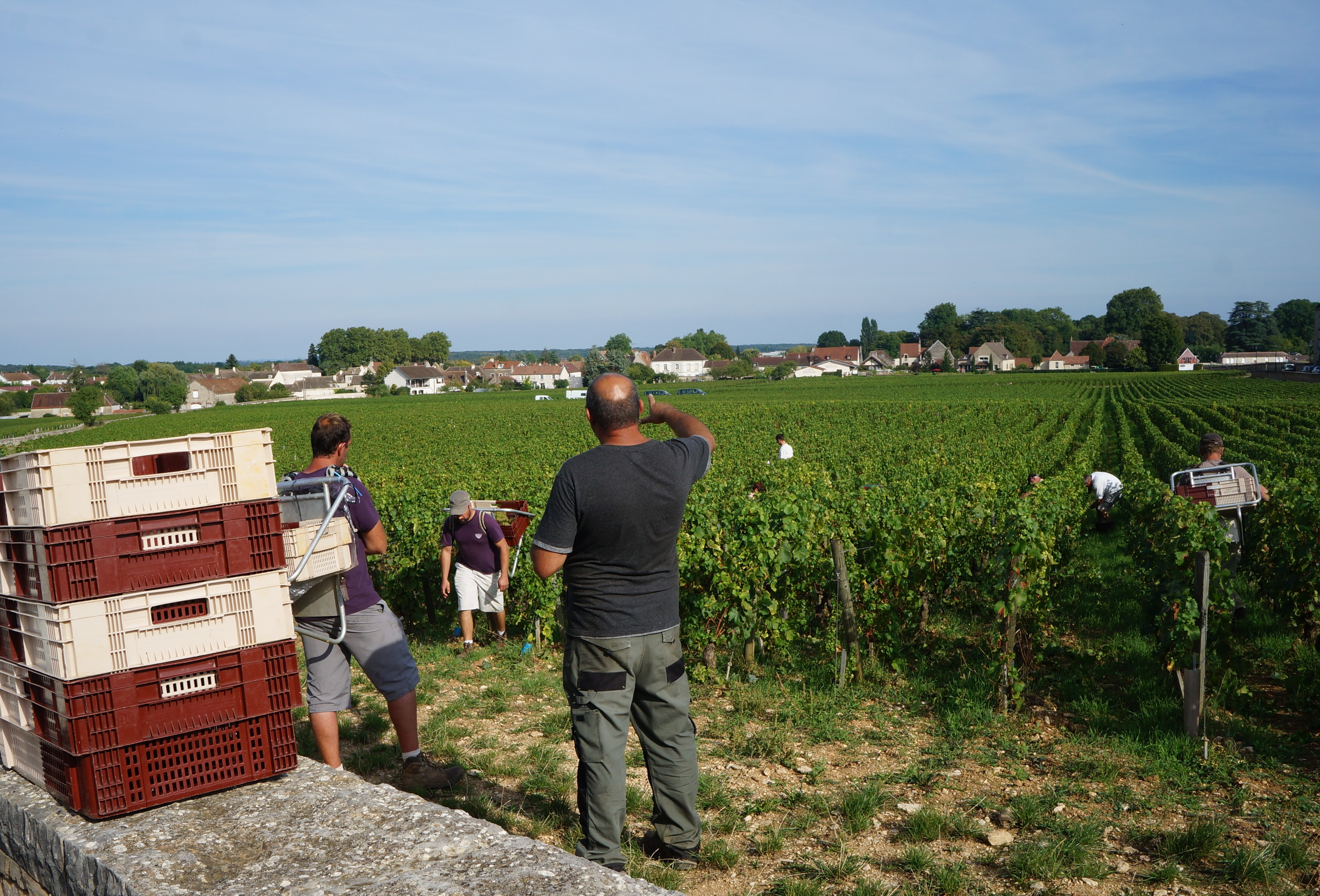 Les vignobles de Musigny Comte de Vogüe, autour de Vosne-romanée (AOC) en Vignoble de la côte de Nuits Vignoble de Bourgogne.- France